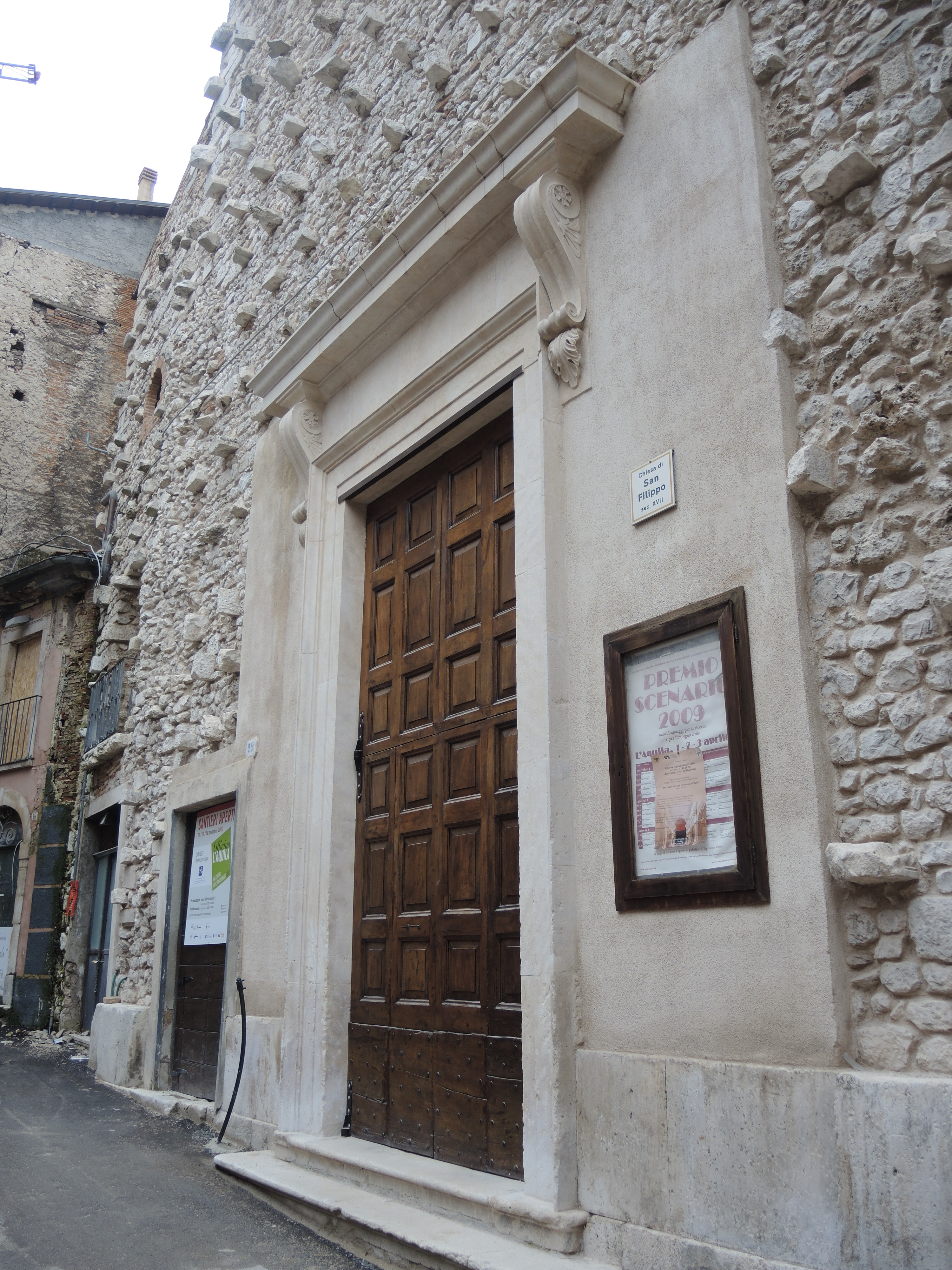 L'Aquila: San Filippo Neri